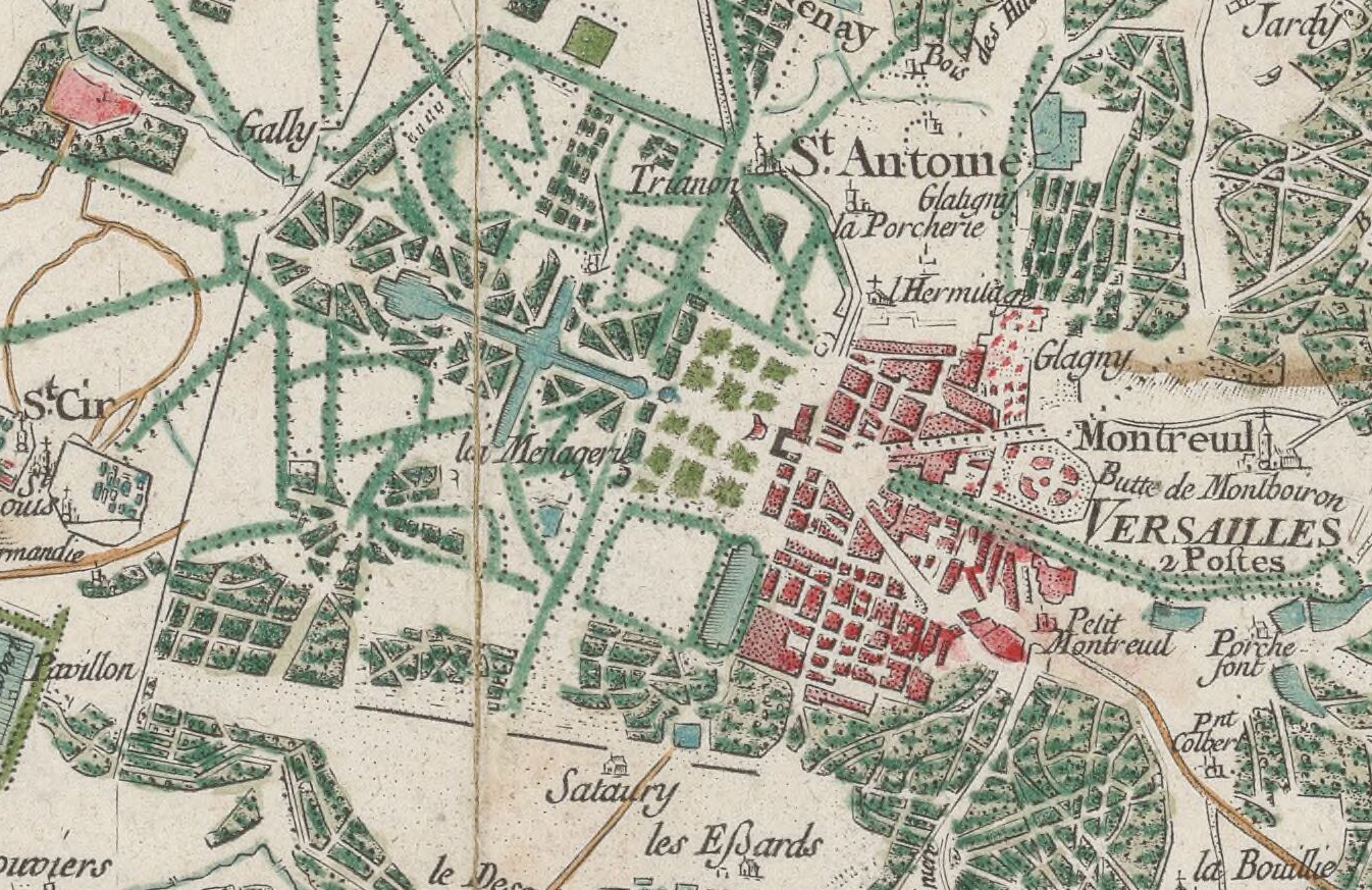 Château de Versailles